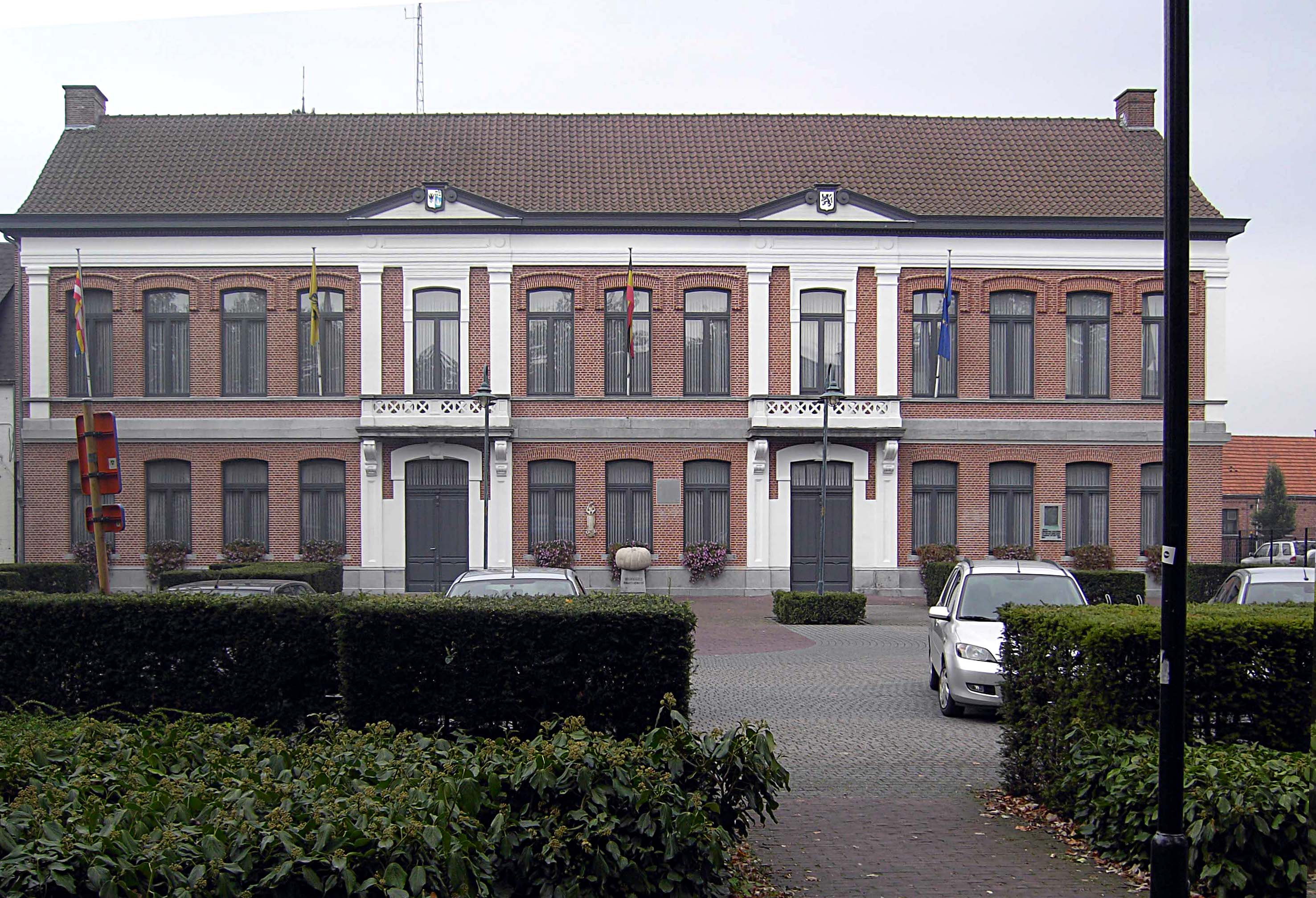 Kasterlee in de provincie Antwerpen - België. Het in 2008 gerestaureerde gemeentehuis. De acht rechter traveëen zijn het werk van arch. Leonard Blomme (1874), de vijf linkse zijn in 1995 aangebouwd.